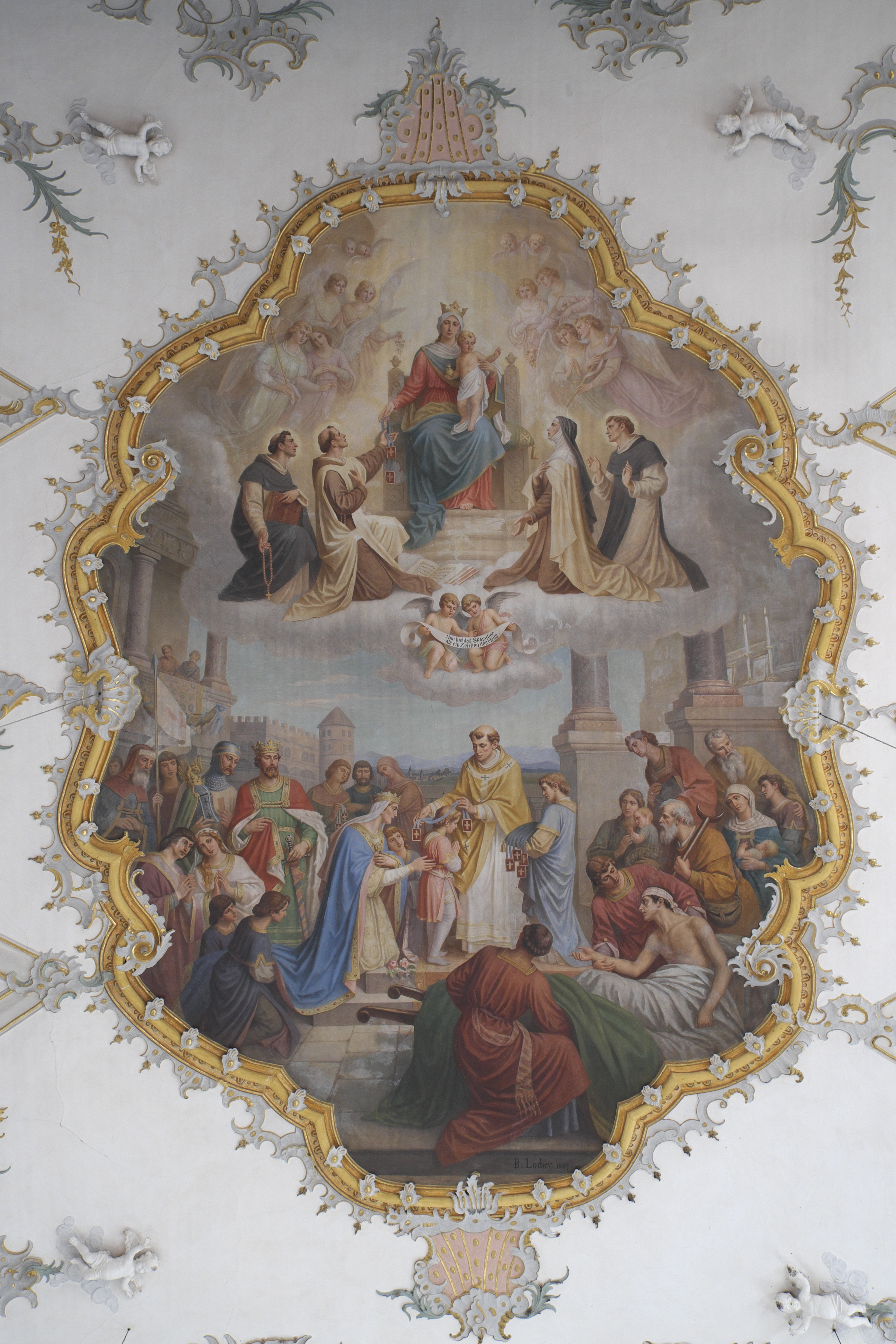 Katholische Pfarrkirche St. Martin in Jengen im Landkreis Ostallgäu (Bayern/Deutschland), Deckenmalerei im Langhaus von Benedikt Locher, von 1889, mit Signatur